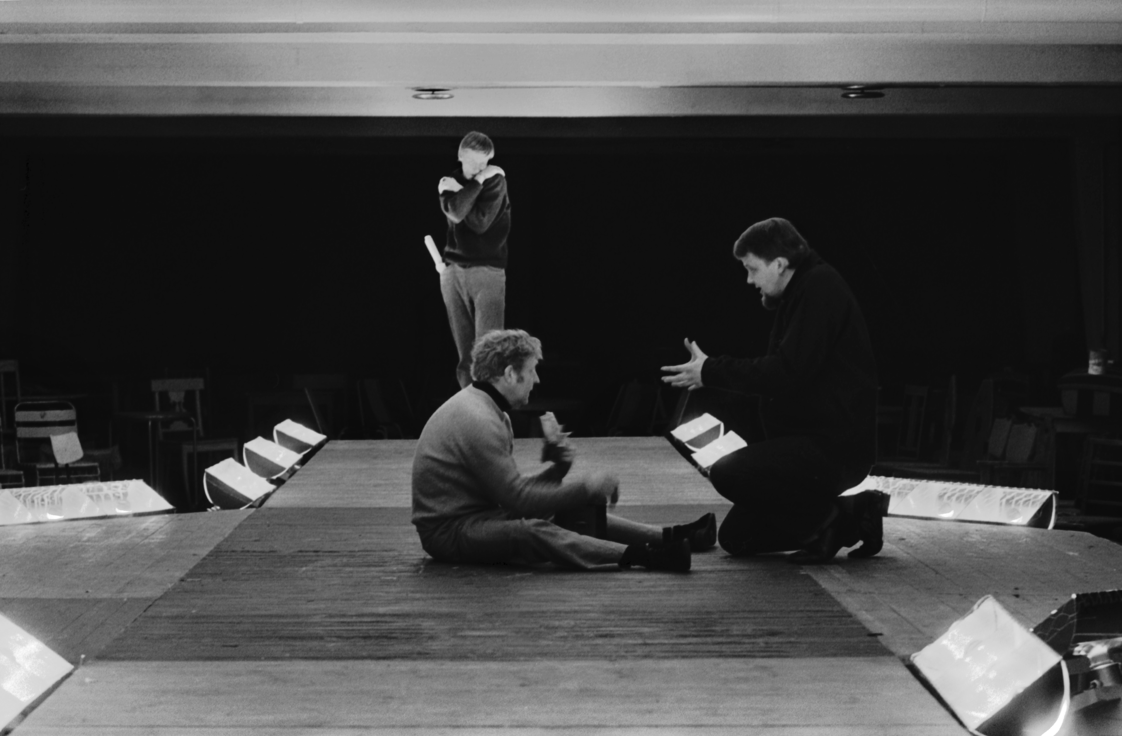 Ohjaaja Kalle Holmberg ohjaamassa Schillerin Rosvot-näytelmän harjoituksia Bunkkeriteatterissa Helsingin Kaupunginteatterin vieressä olevassa Eläintarhantien kallioväestönsuojassa. Keskellä näyttelijä Olavi Ahonen.